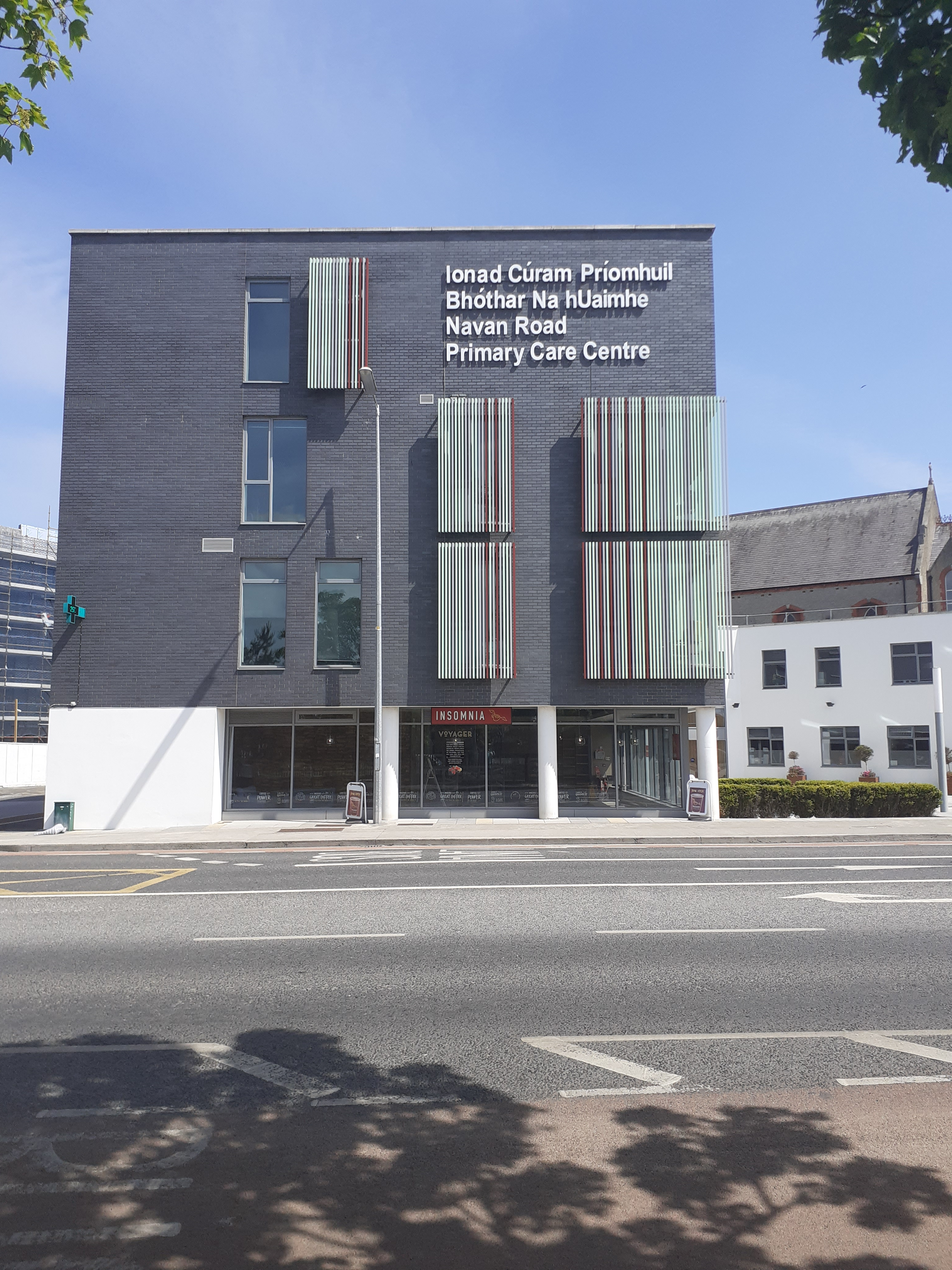 Ionad Cúram Príomhúil Bhóthar na hUaimhe, An Chabrach. (2020)